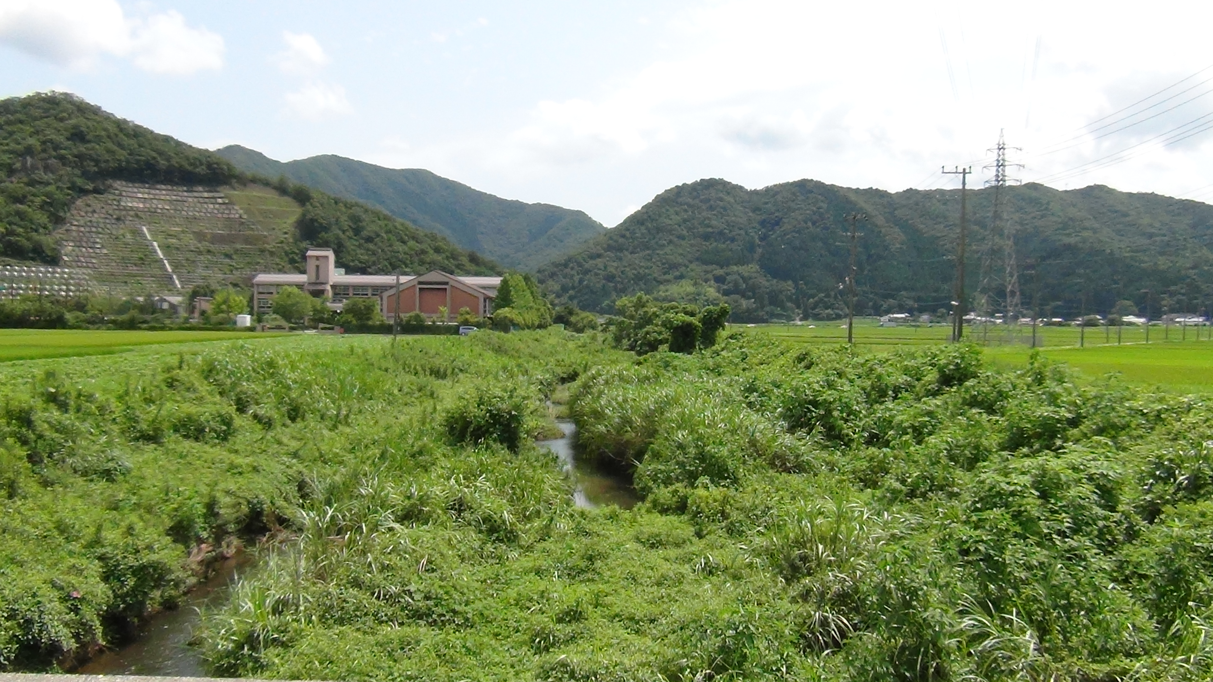 武庫川の始点 真南条川と田代川との合流地点である。 篠山市